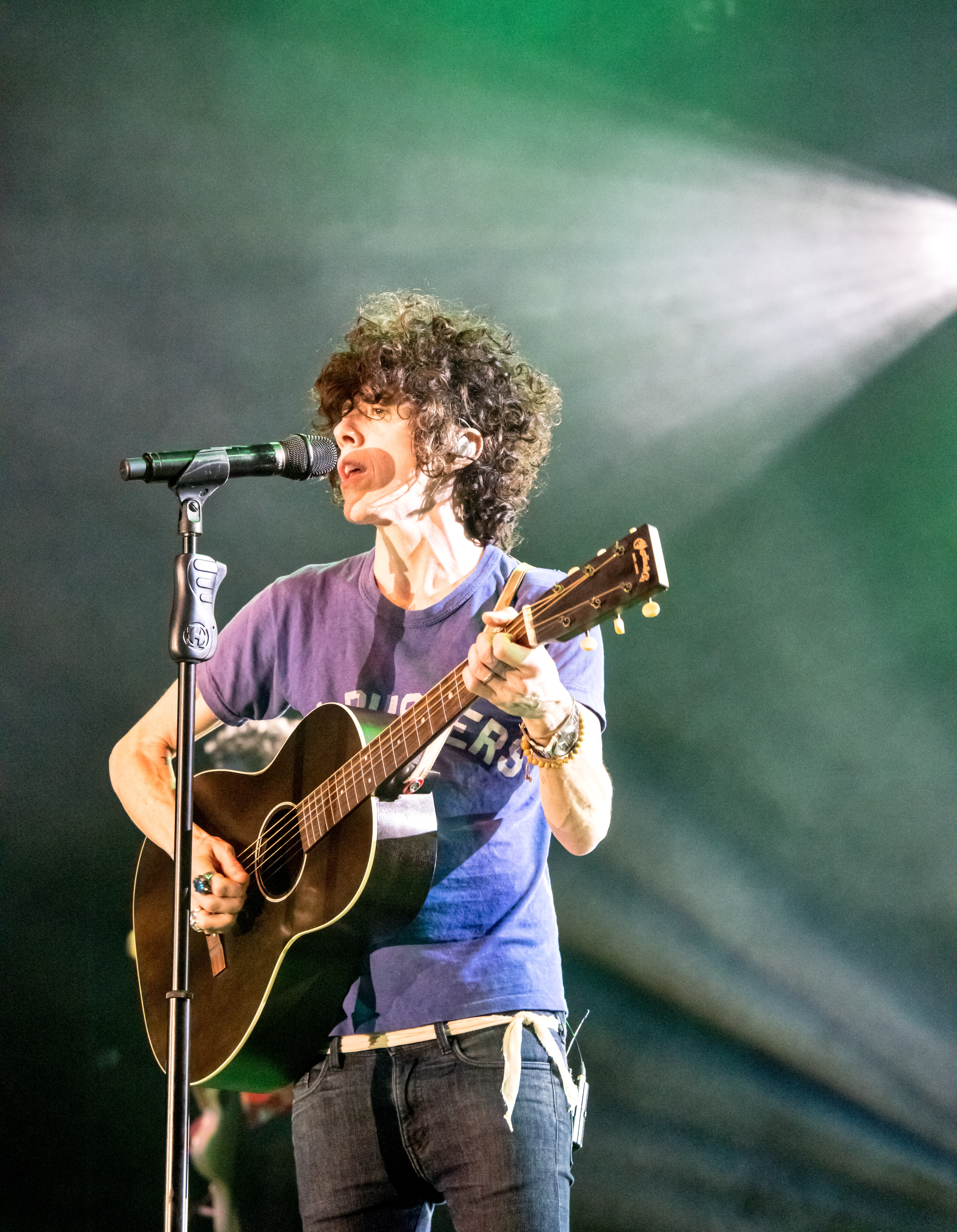 Bilder vom Zelt Musik Festival 2018 in Freiburg im Breisgau LP am 28.07.2018 im Zirkuszelt